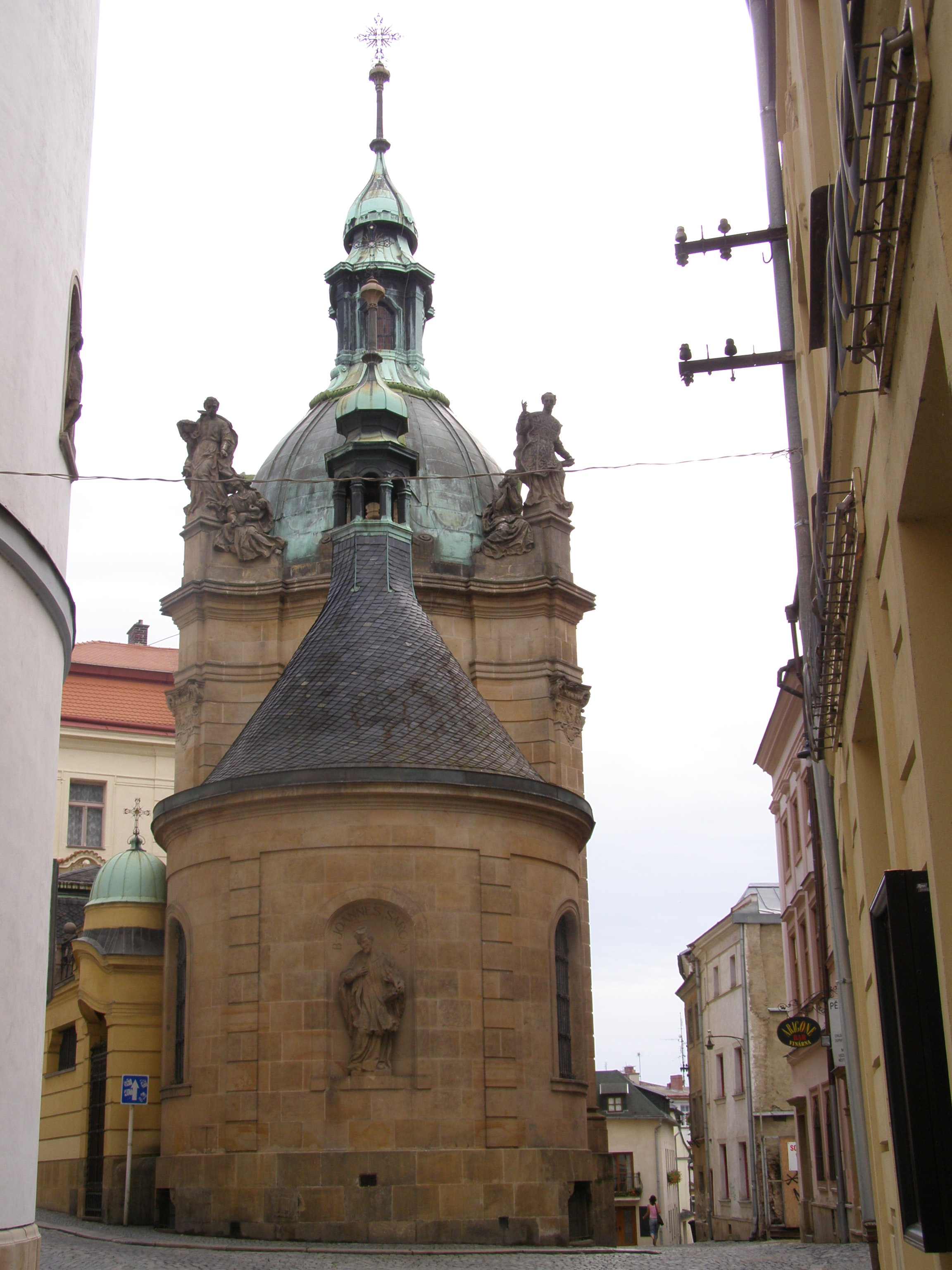 Kaple svatého Jana Sarkandra v Olomouci